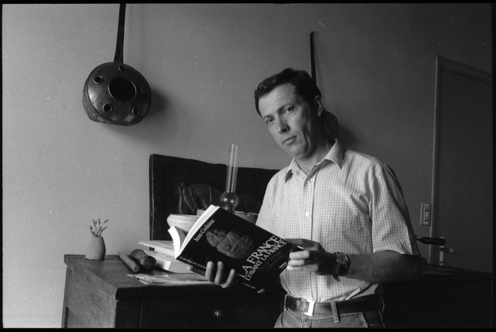 Ladern-sur-Lauquet (Aude). 14 Août 1980. Portrait de Jean Guilaine consultant son ouvrage "La France d'avant la France. Du néolithique à l'âge du fer" à l'occasion de sa sortie.